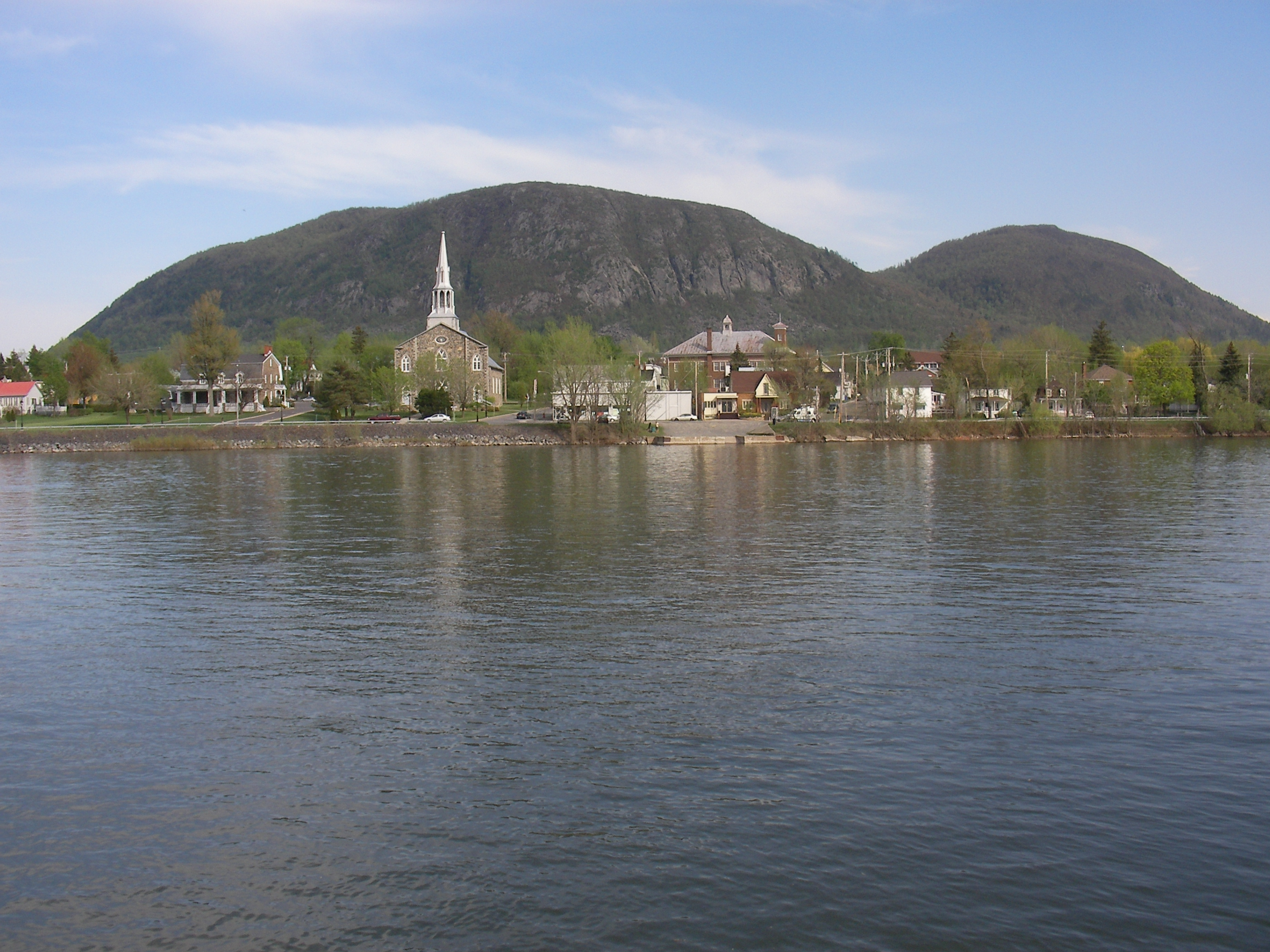 Village de Mont-Saint-Hilaire avec la montagne en arrière plan.